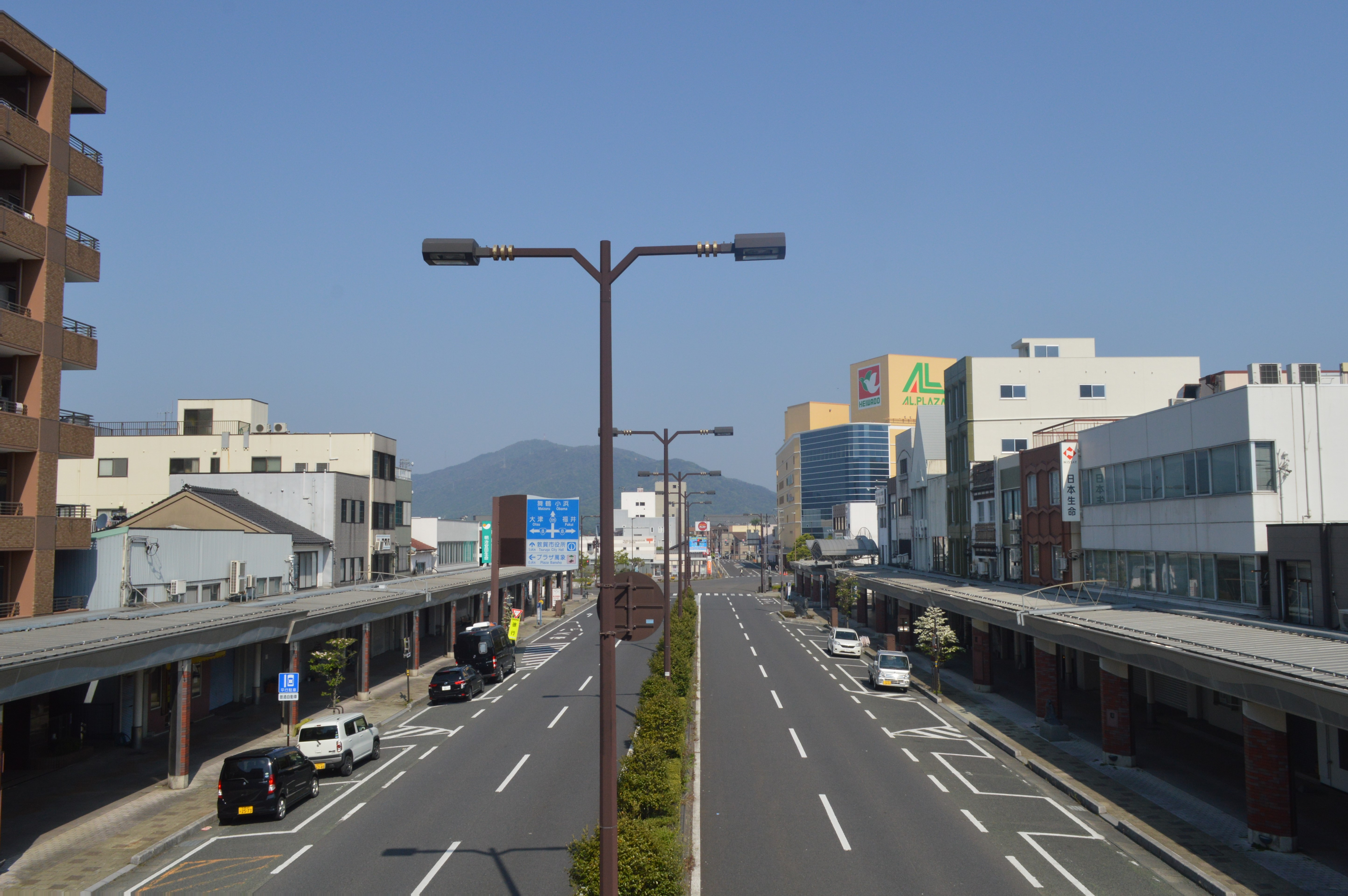 福井県敦賀市の敦賀駅前通り。